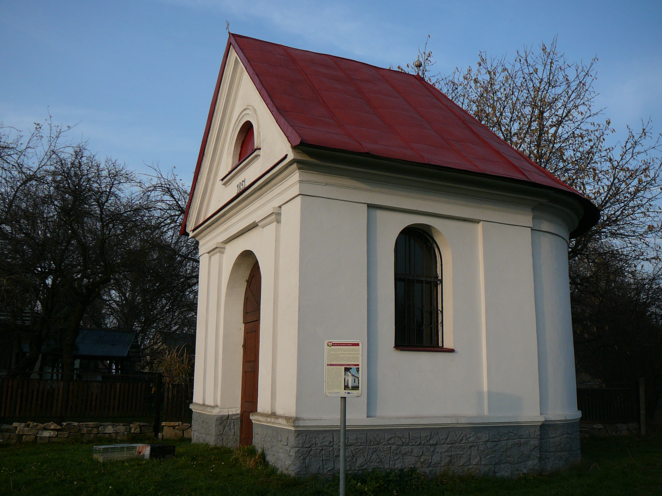 sakrální památky frýdecko-místecka